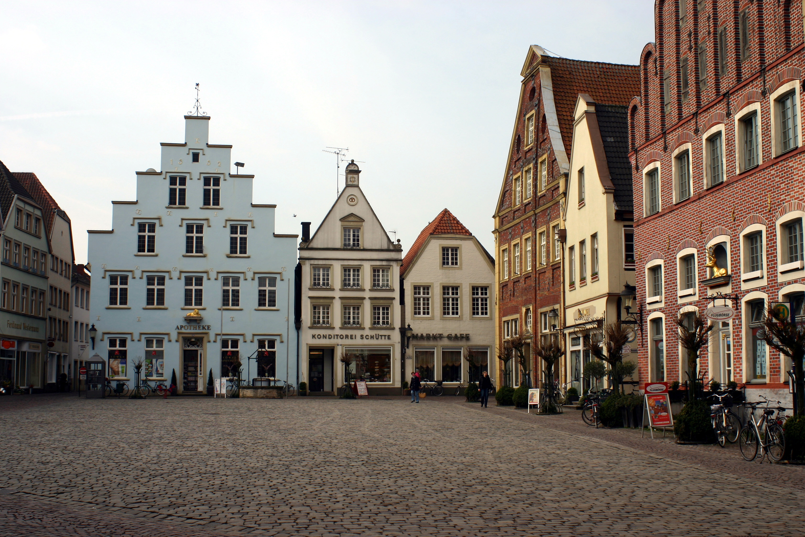 Warendorf, Markt